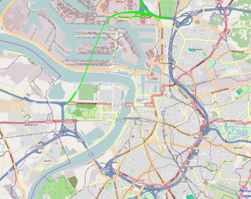 Oosterweelverbinding: Schema van het boortunneltracé ontwikkeld door Arup/SUM in juli 2009 in opdracht van de stad Antwerpen.